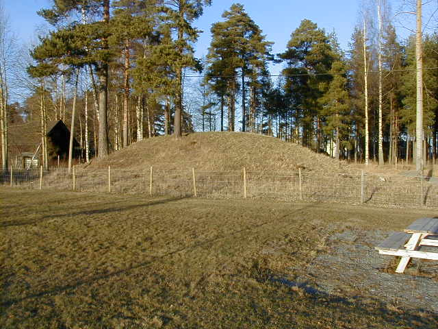 Fra Veien Kulturminnepark